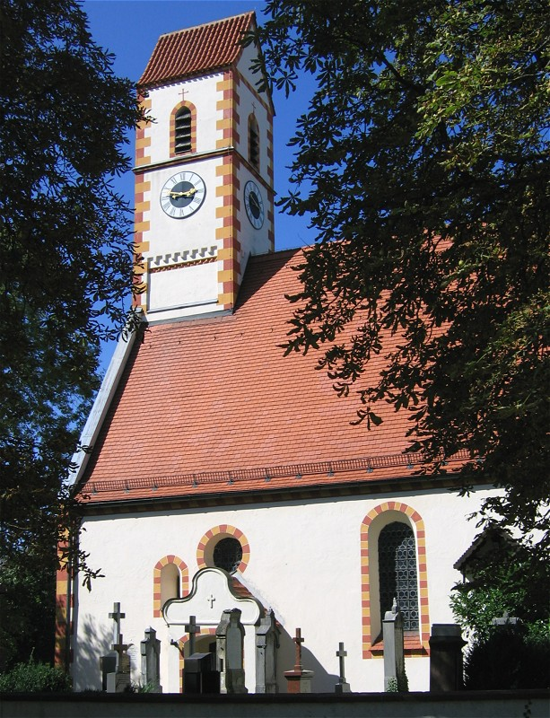 St. Martin in Muenchen-Moosach